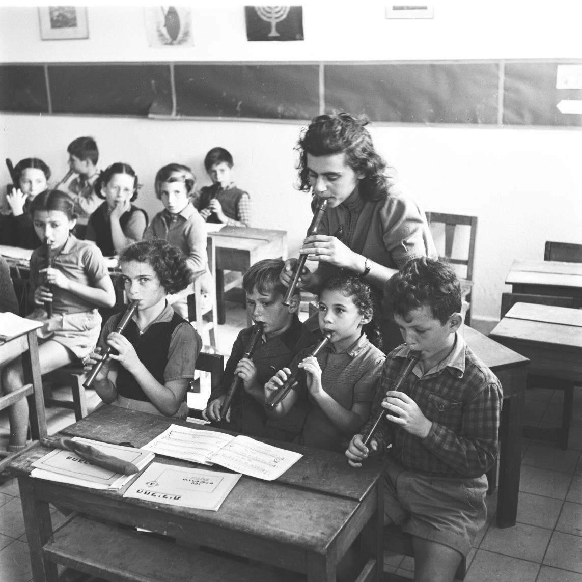 אוסף צילומים של הצלם זולטן קלוגר טווח מספרי התשלילים 26048 - 26085